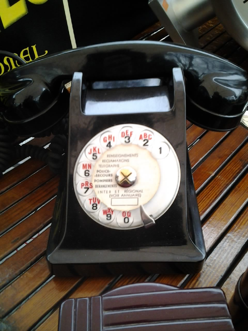 Ancien appareil téléphonique à disque rotatif - France - Années 1950-1960